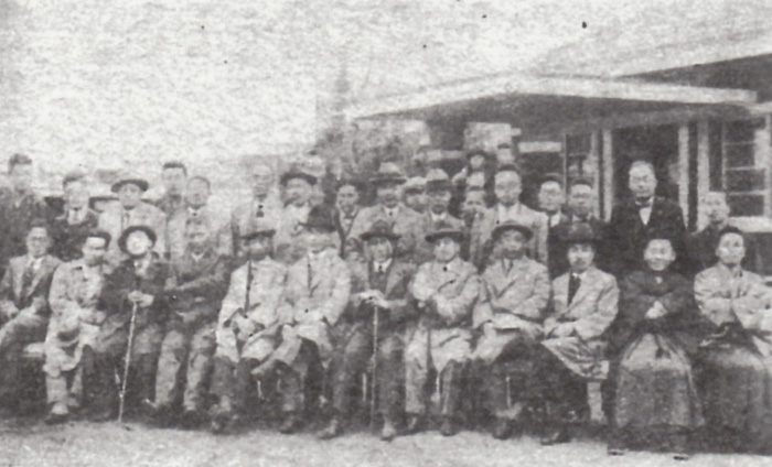 マキノ・プロダクション中部撮影所、1927年の写真